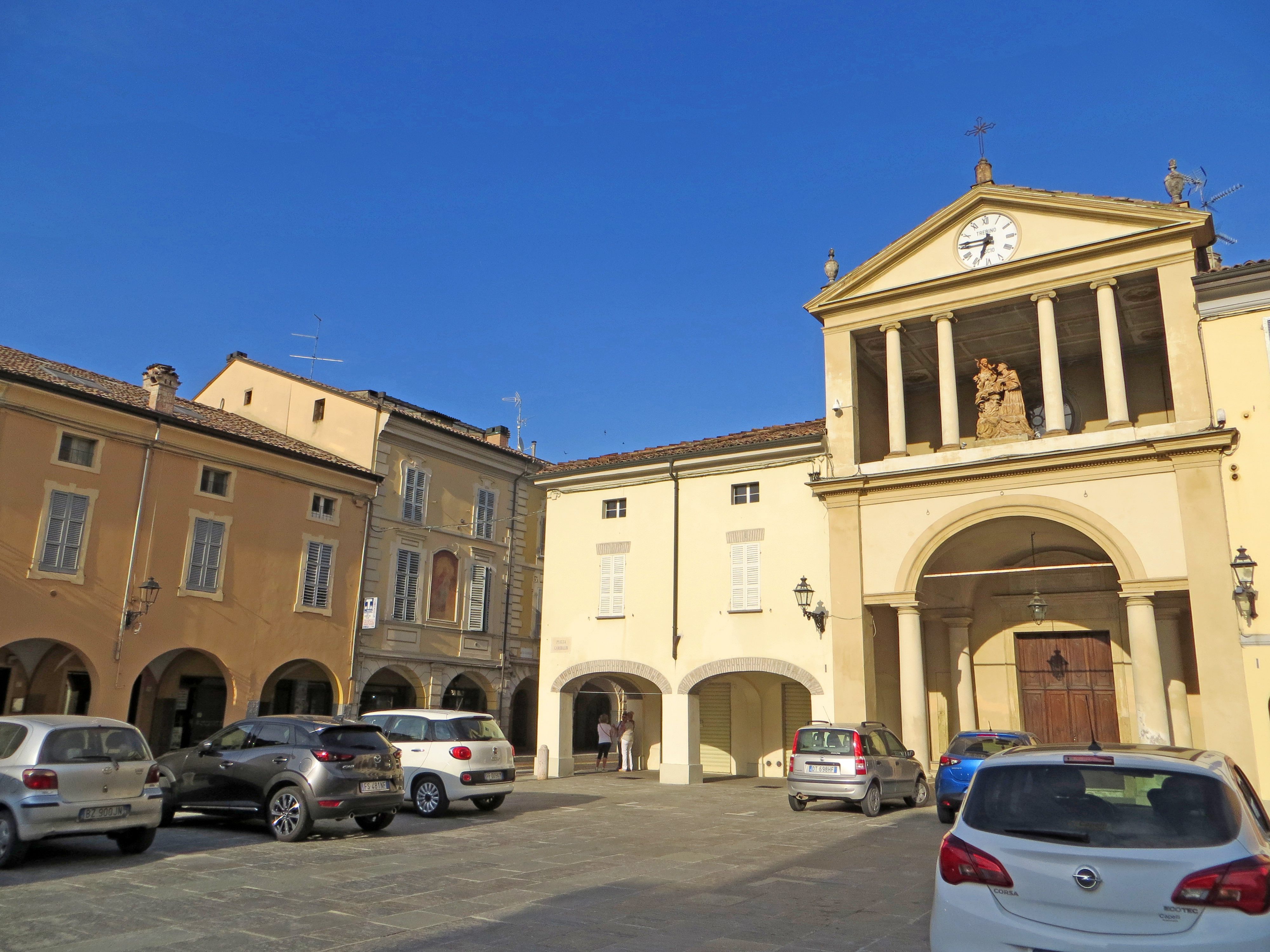 Piazza Garibaldi (Soragna) - lato est